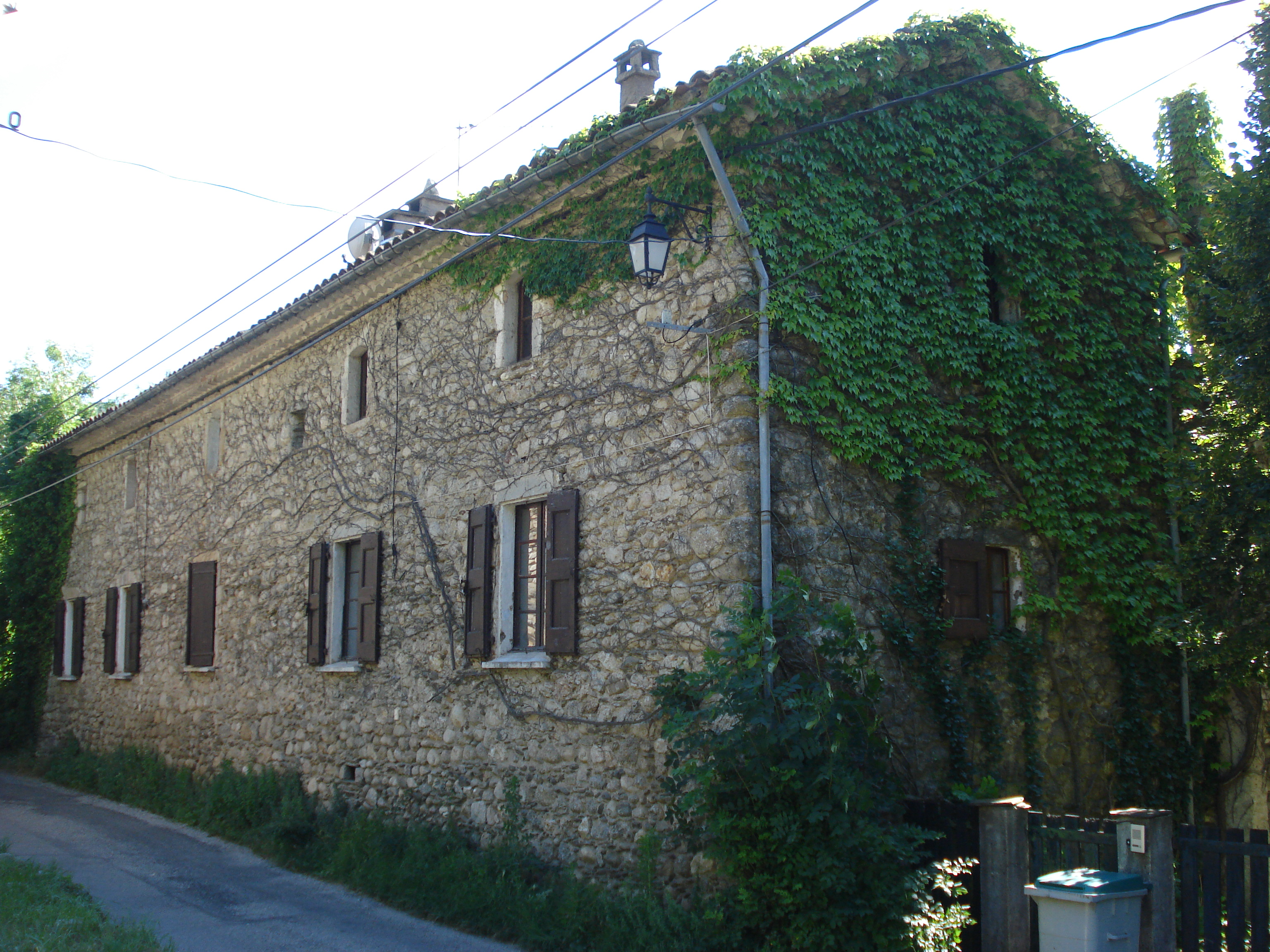 Génolhac: maison du romancier Jean-Pierre Chabrol à Pont-de-Rastel.